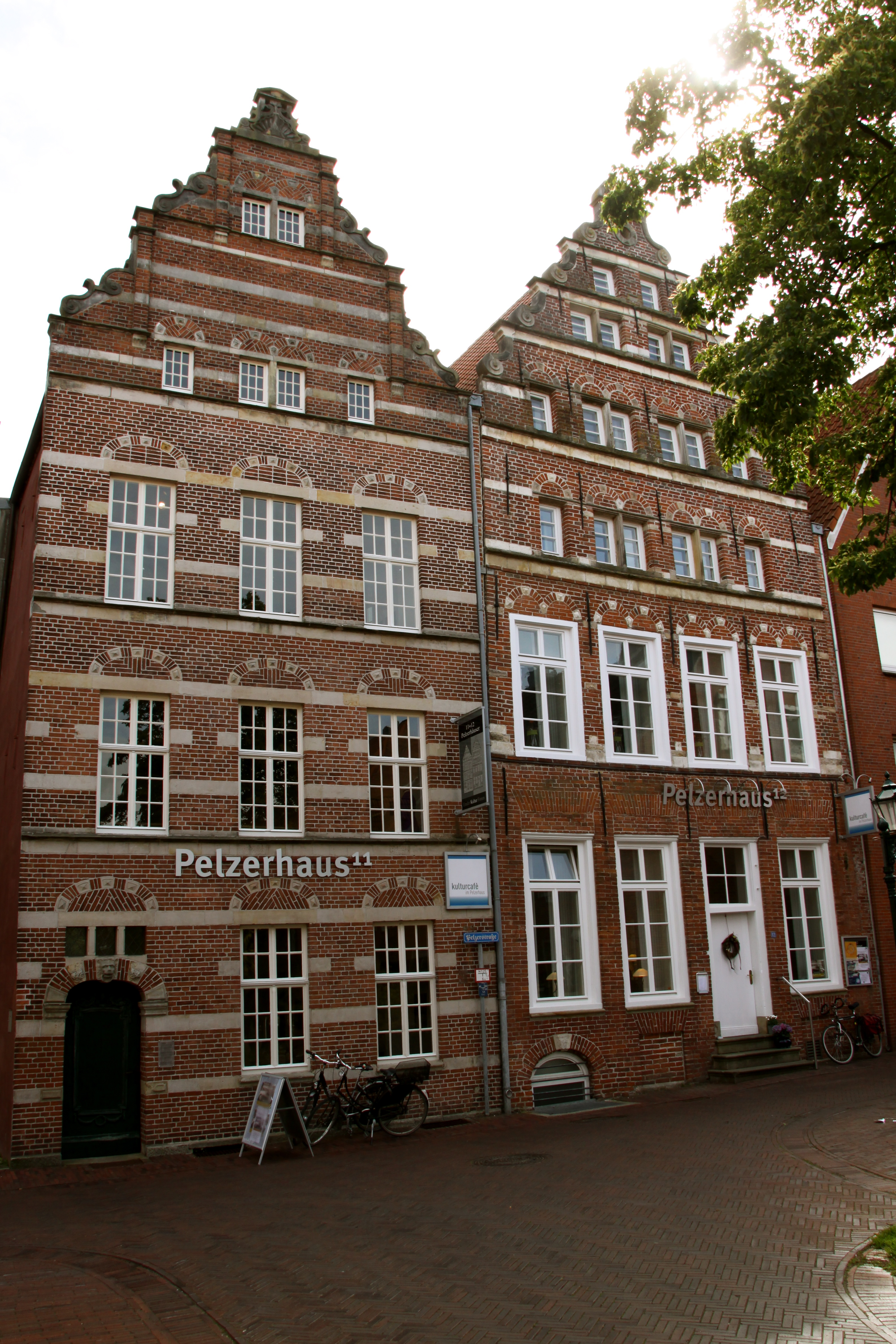 Die Pelzerhäuser in Emden